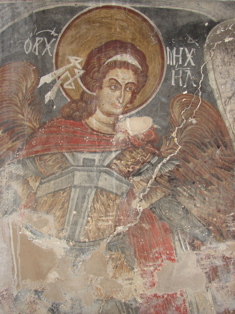 Фреска от Торнишкия манастир, Гревенско, Гърция